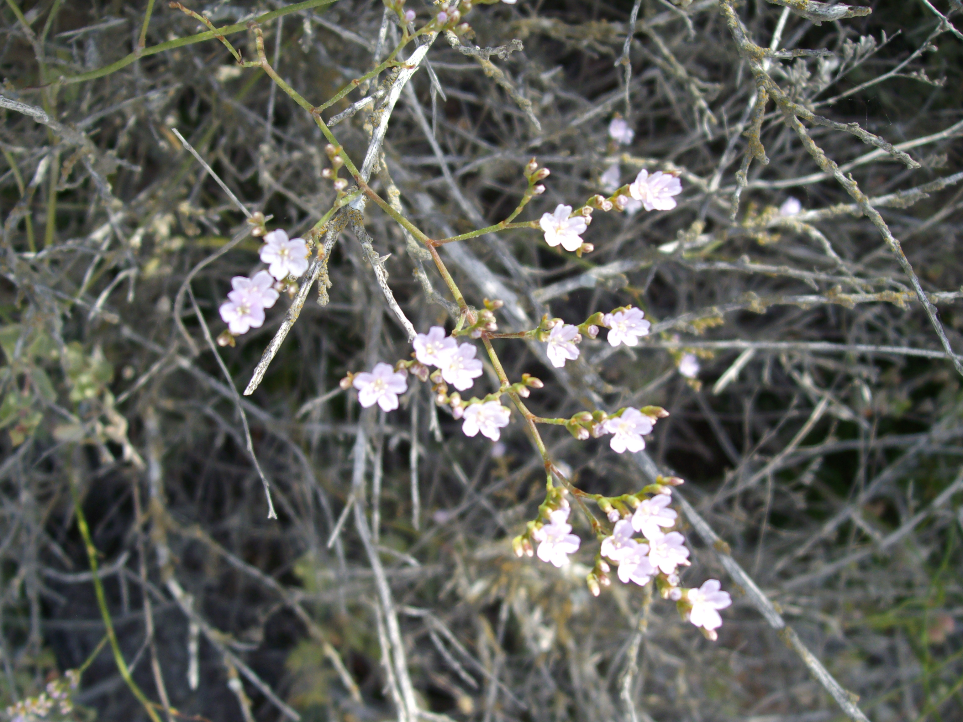 Flor de Limonium vulgare